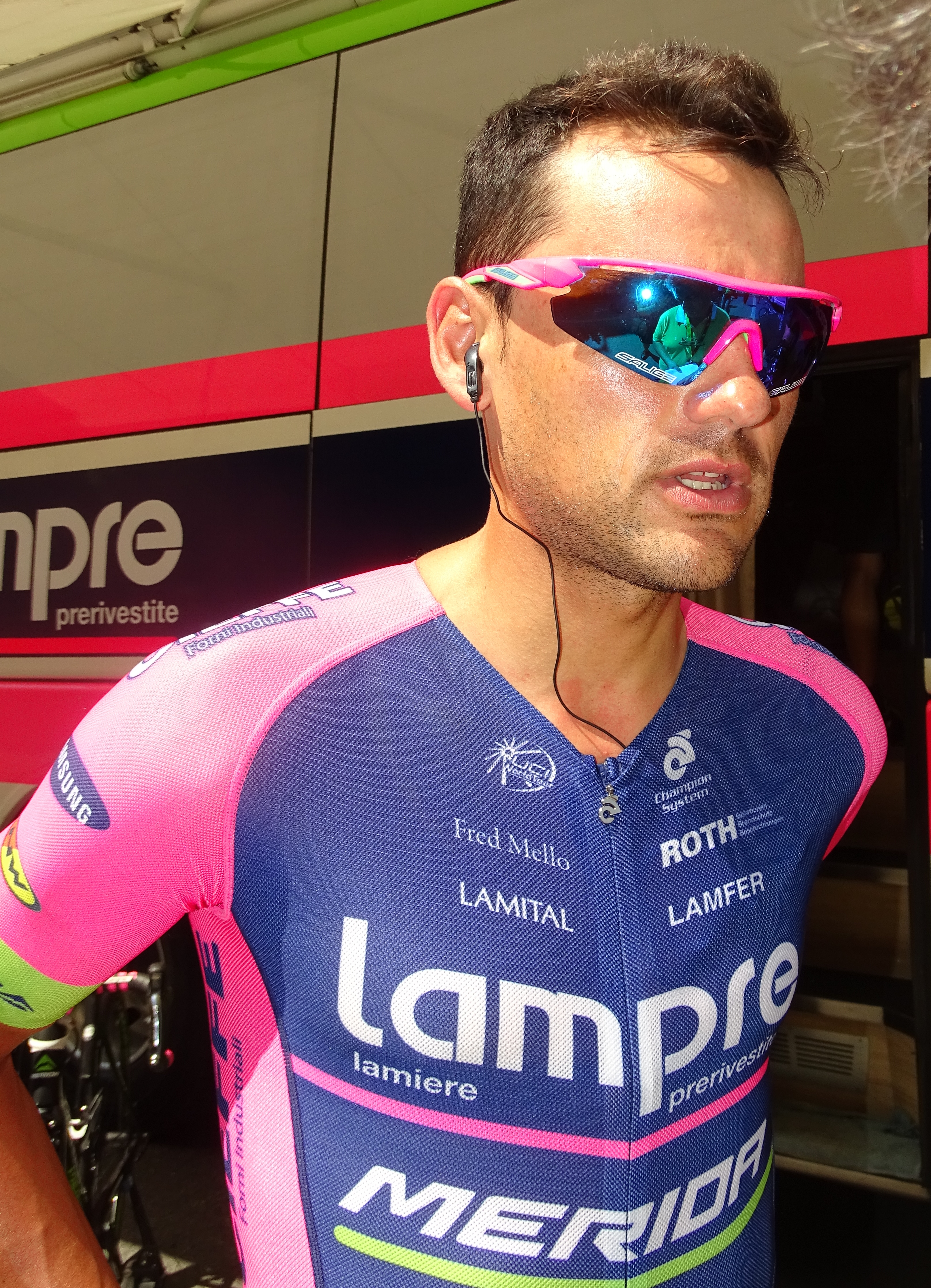 Reportage réalisé le lundi 6 juillet à l'occasion du départ de la troisième étape du Tour de France 2015 à Anvers, Belgique.